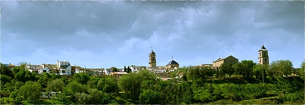 vista de Castellar, provincia de Jaen